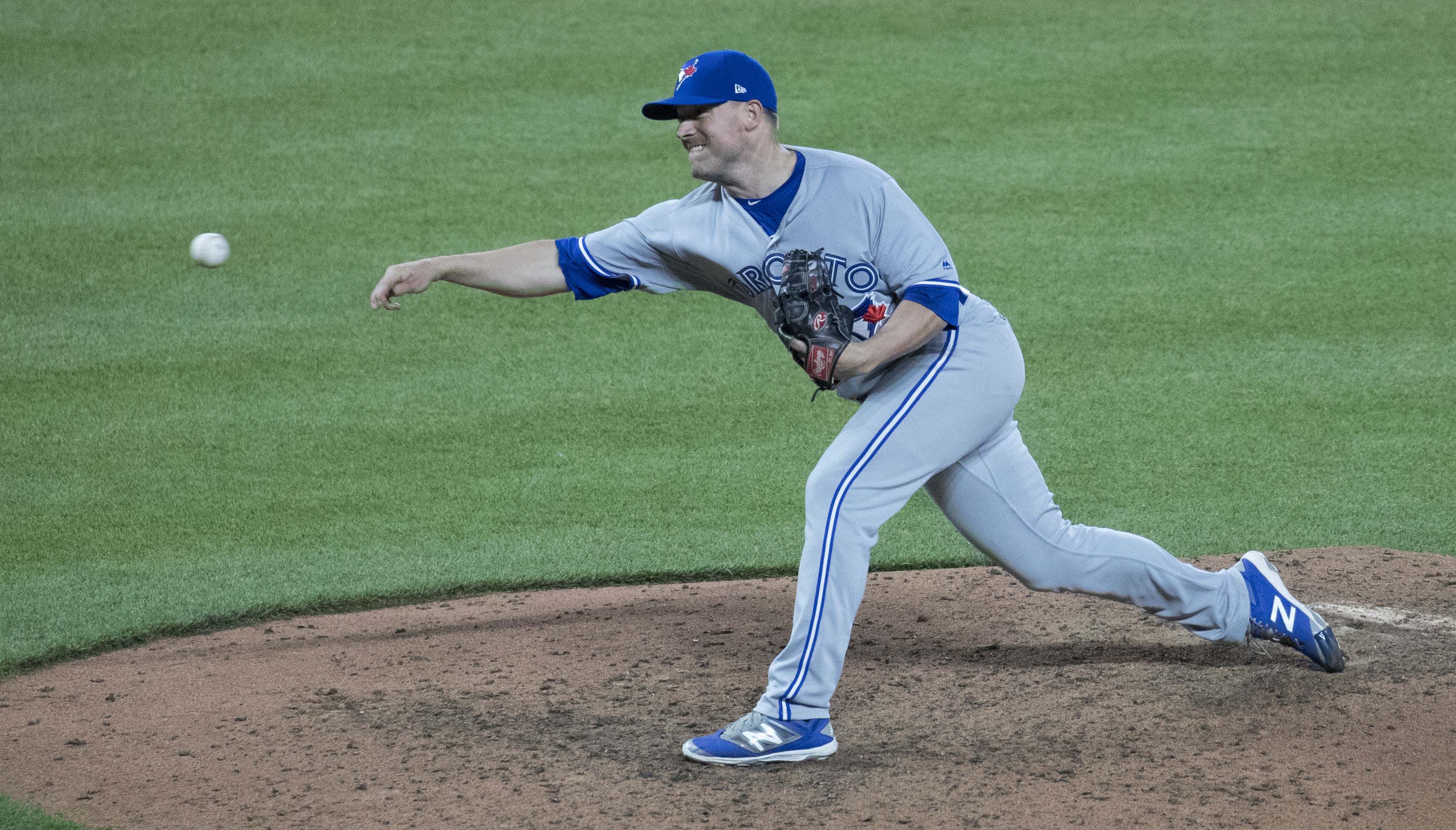 Blue Jays at Orioles 5/19/17